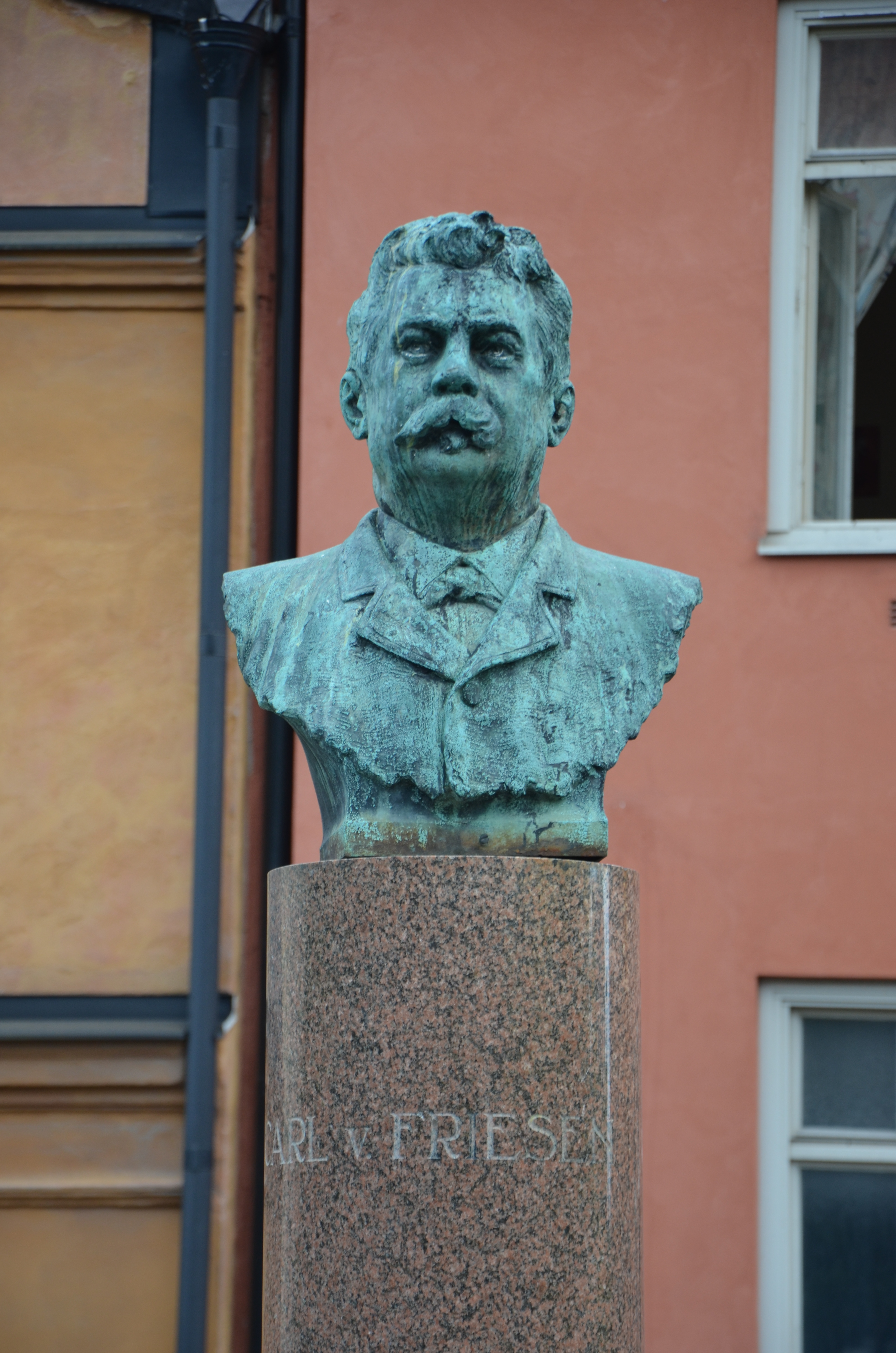 Byst över Carl von Friesen av John Börjeson, skolgården på Södra Latin på Södermalm i Stockholm